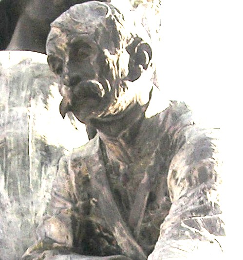 Manuel J. Campos. Militar argentino. Escultura en su tumba. Cementerio de la Recoleta. Buenos Aires